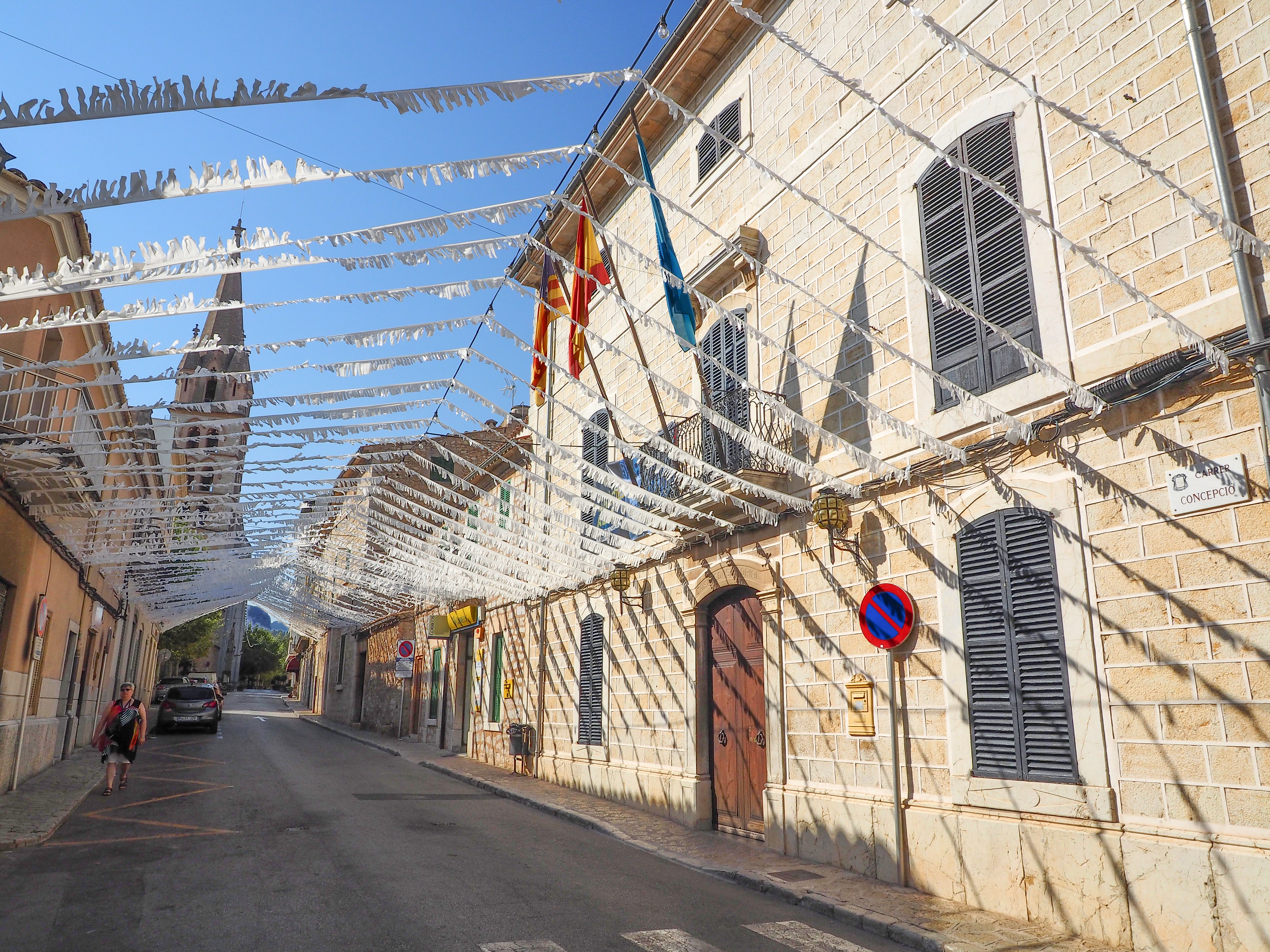 Rathaus Binissalem, Mallorca